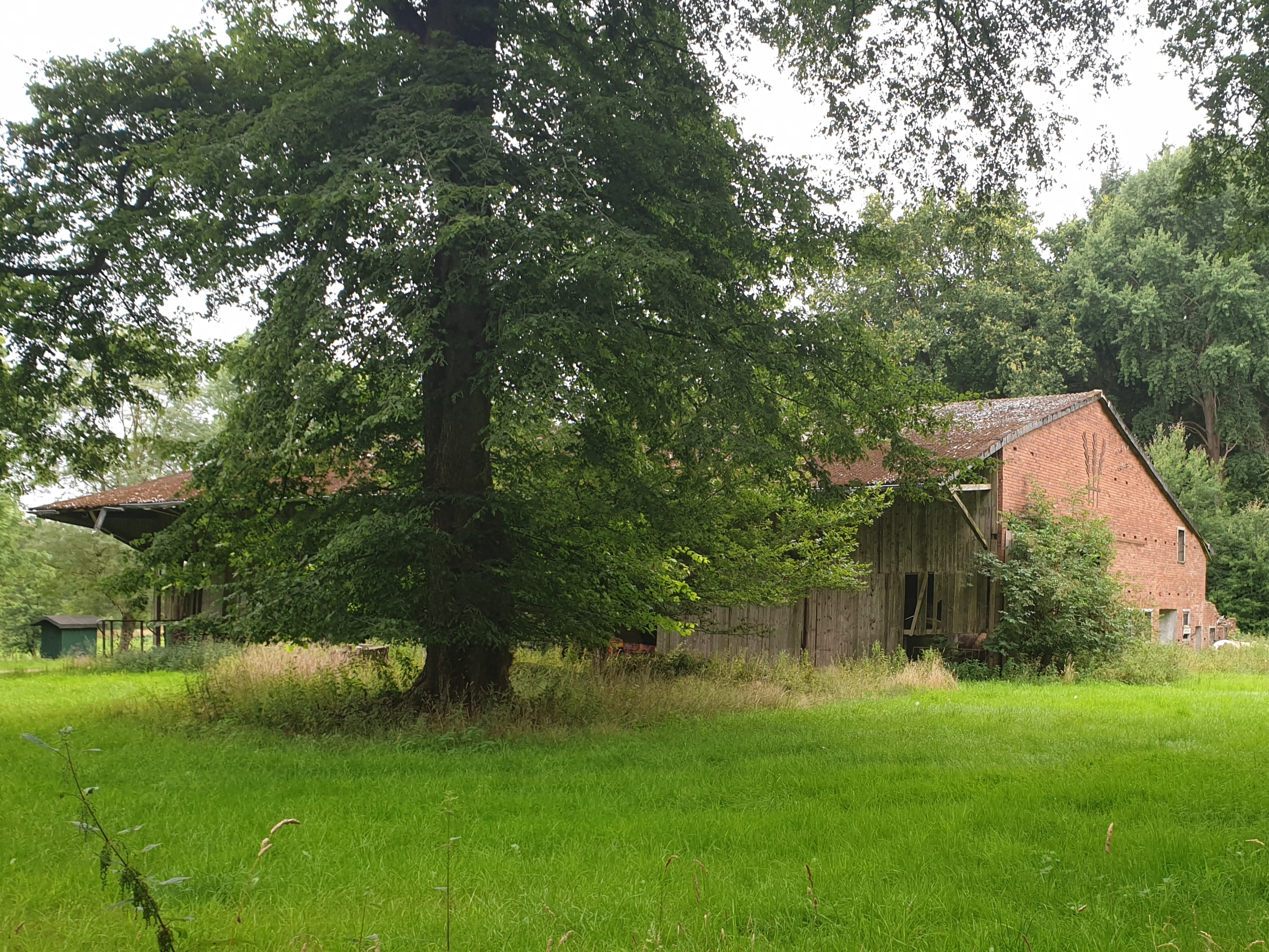 Die Hofstelle Sünderwald lag im gleichnamigen Waldgebiet in der jetzigen Gemeinde Hipstedt im niedersächsischen Landkreis Rotenburg (Wümme) und gehörte ab ca. 1850 zur Gemeinde "Einstellige Höfe"; wechselte aber in den 1920er Jahren in die Gemeinde Hipstedt. Der Hof wurde später an eine Immobilienfirma verkauft, die Umnutzungsplanungen konnte jedoch nicht realisiert werden. Das alte Hallenhaus im niedersächsischen Fachwerkstil verfiel. Heute ist beim Sünderwald nur noch eine baufällige Scheune aus den 1950er/60er Jahren zu finden (siehe Bild), die offenbar noch landwirtschaftlich genutzt wird.